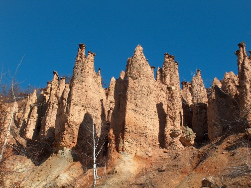 snimio Zoran Radović